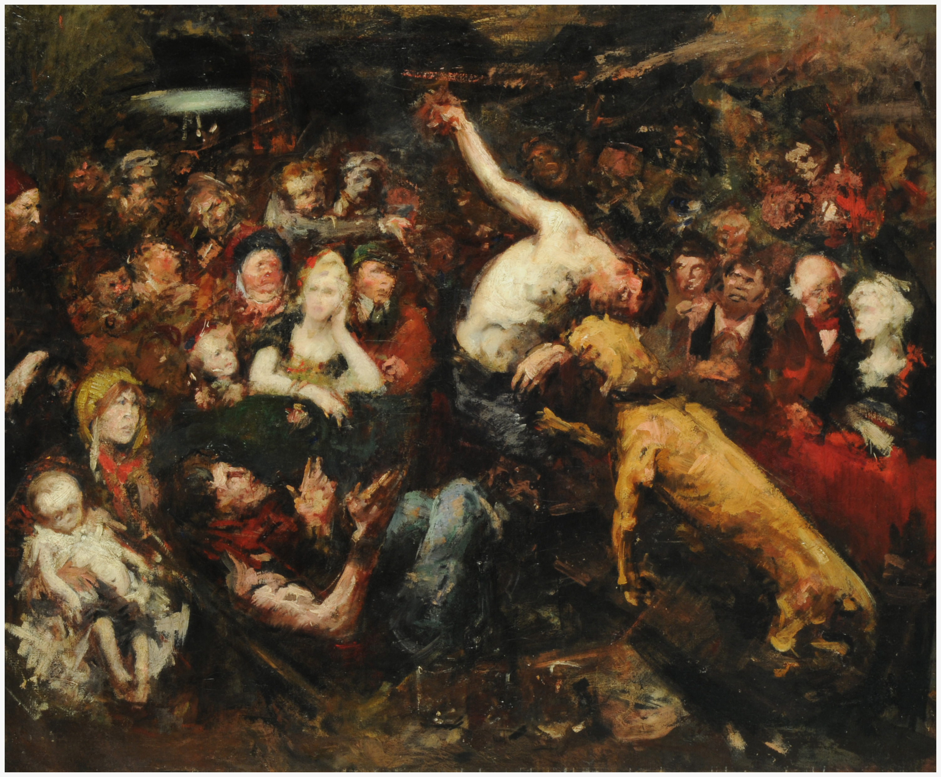 Félicien Rops, Combate entre un hombre y un moloso en el país valón. Siglo XIX. 60 x 73 cm, con marco: 76,5 x 89,5 cm, óleo sobre tela. Inv. 8554.